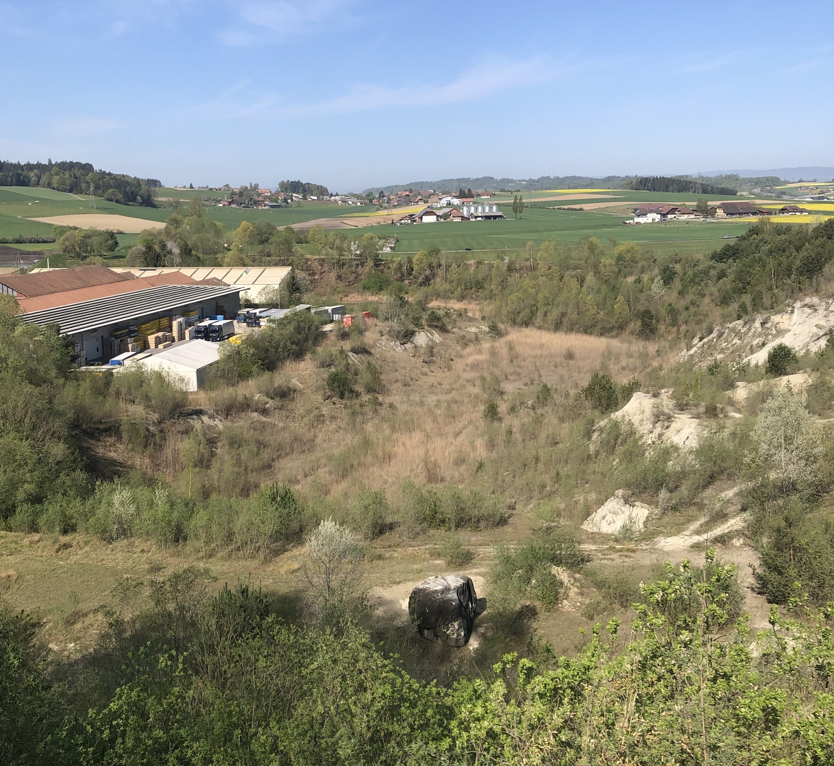 Kiesgrube Rehhag